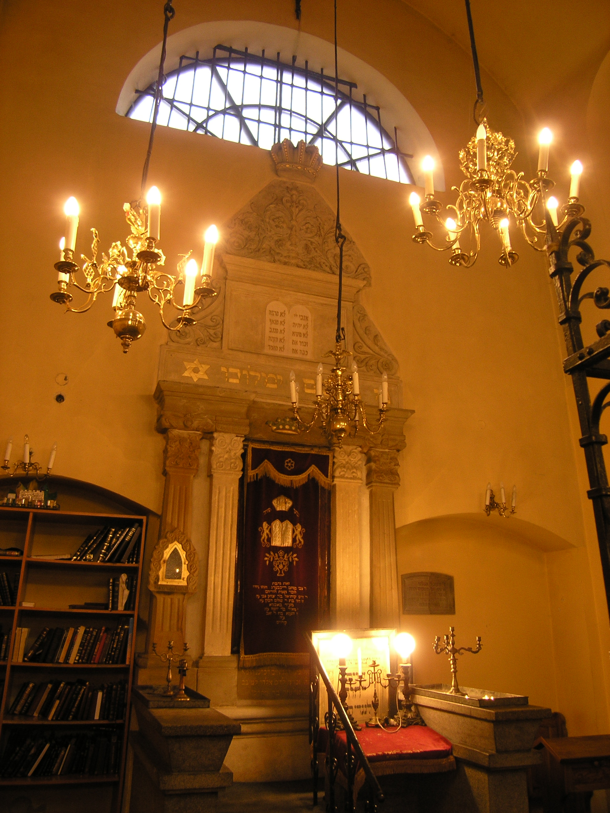 Innenansicht der Remuh-Synagoge, Krakau, Polen; eigene Aufnahme des Autors